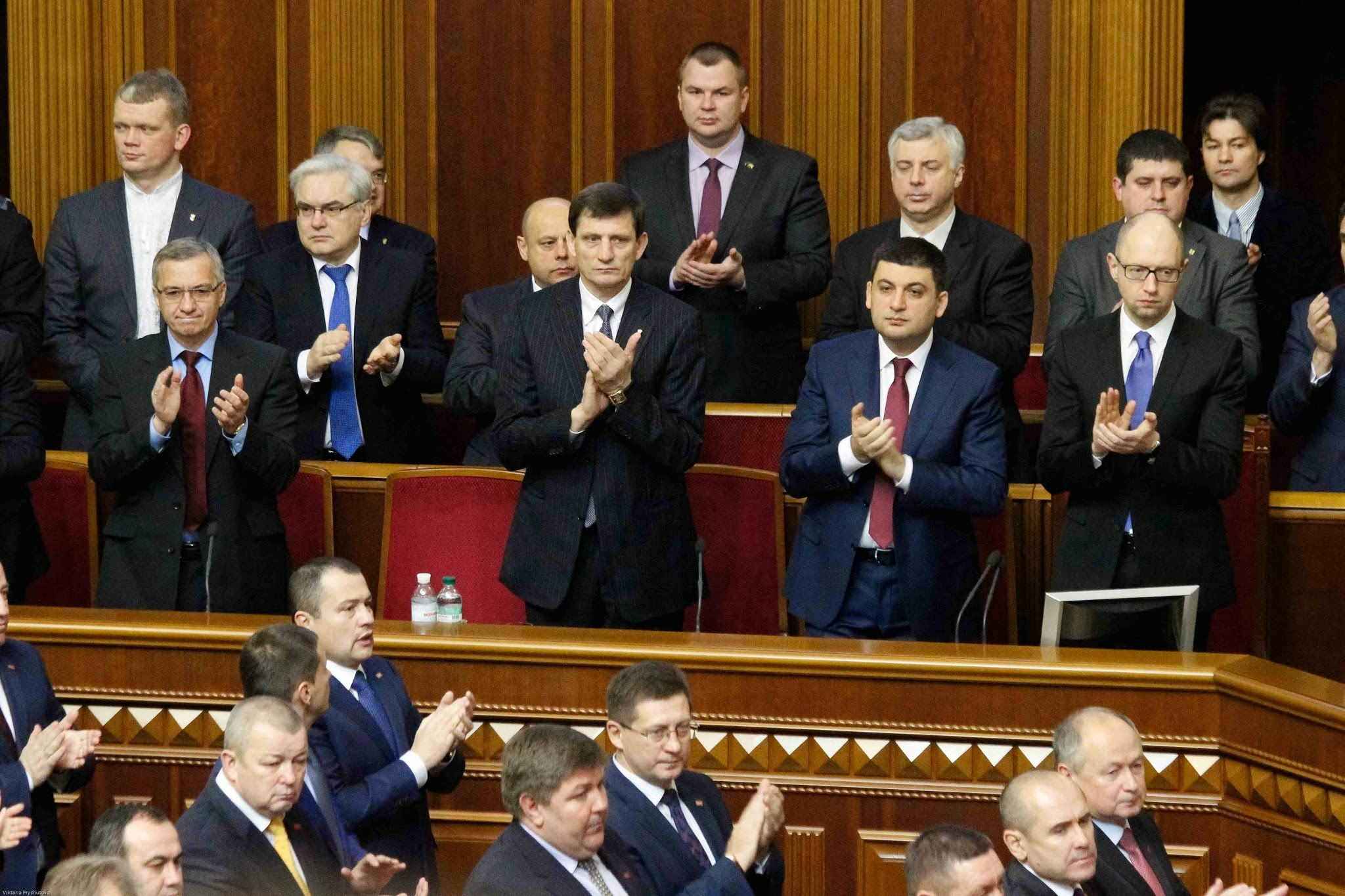 Перший уряд Яценюка в день складання повноважень